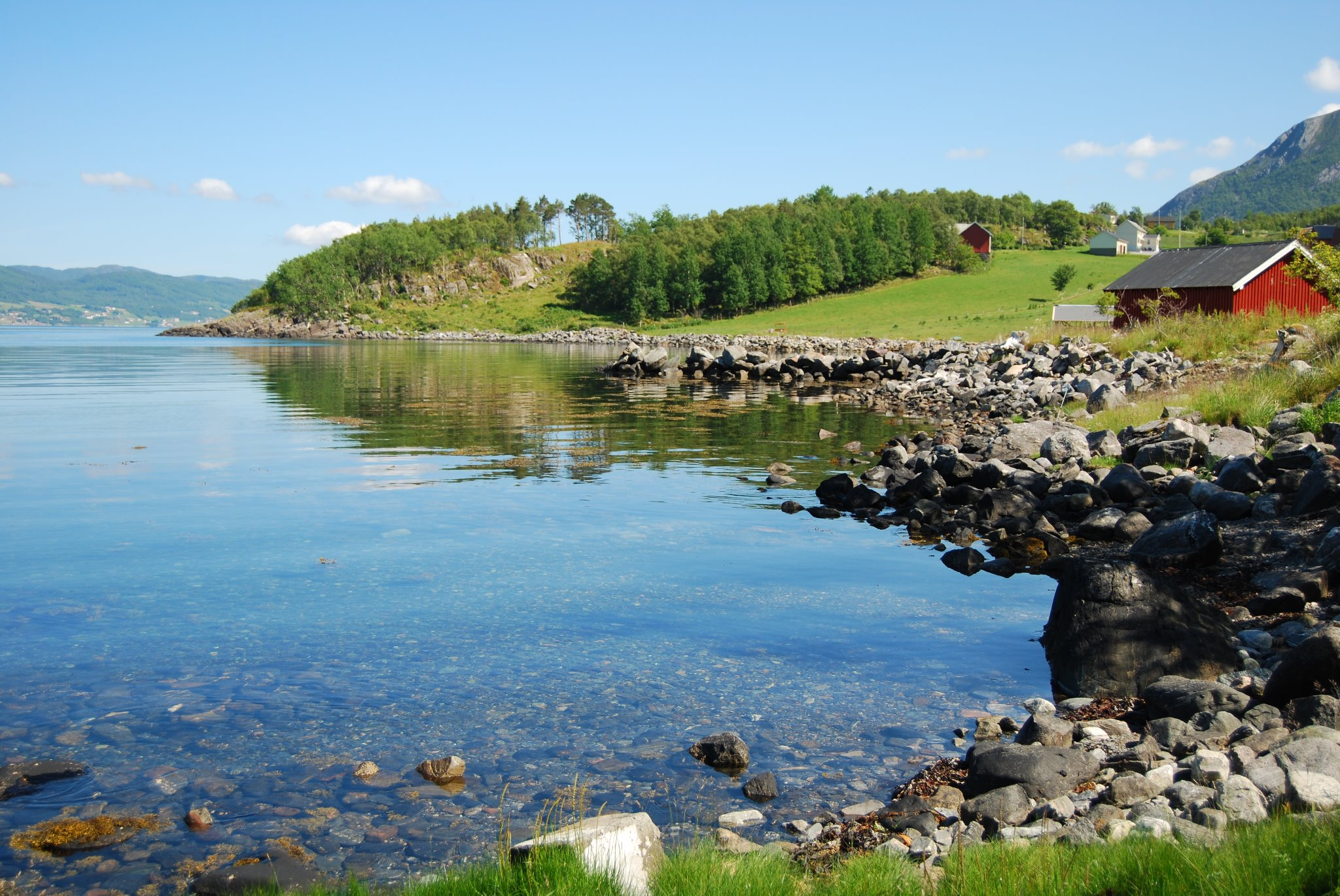 Stakvika